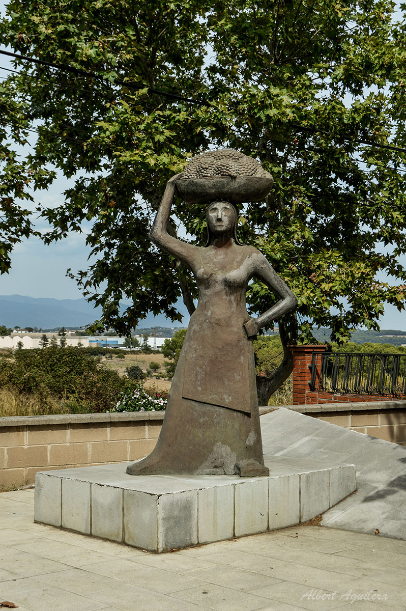 Escultura en homenatge a totes les dones pages del Vallès, obra de l'artísta Enric Gelpí